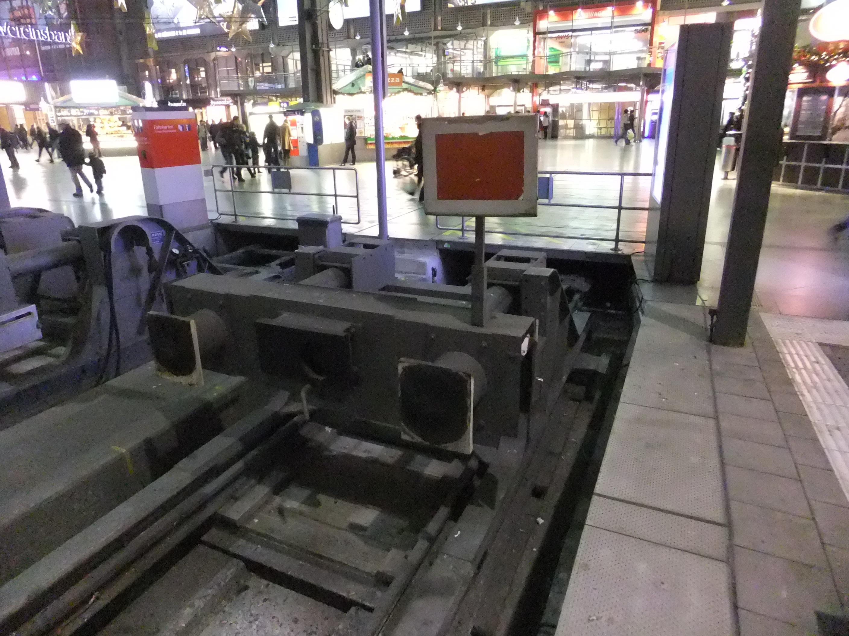 Sh 2-Scheibe mit der Signalbedeutung Schutzhalt. im Münchener Hauptbahnhof